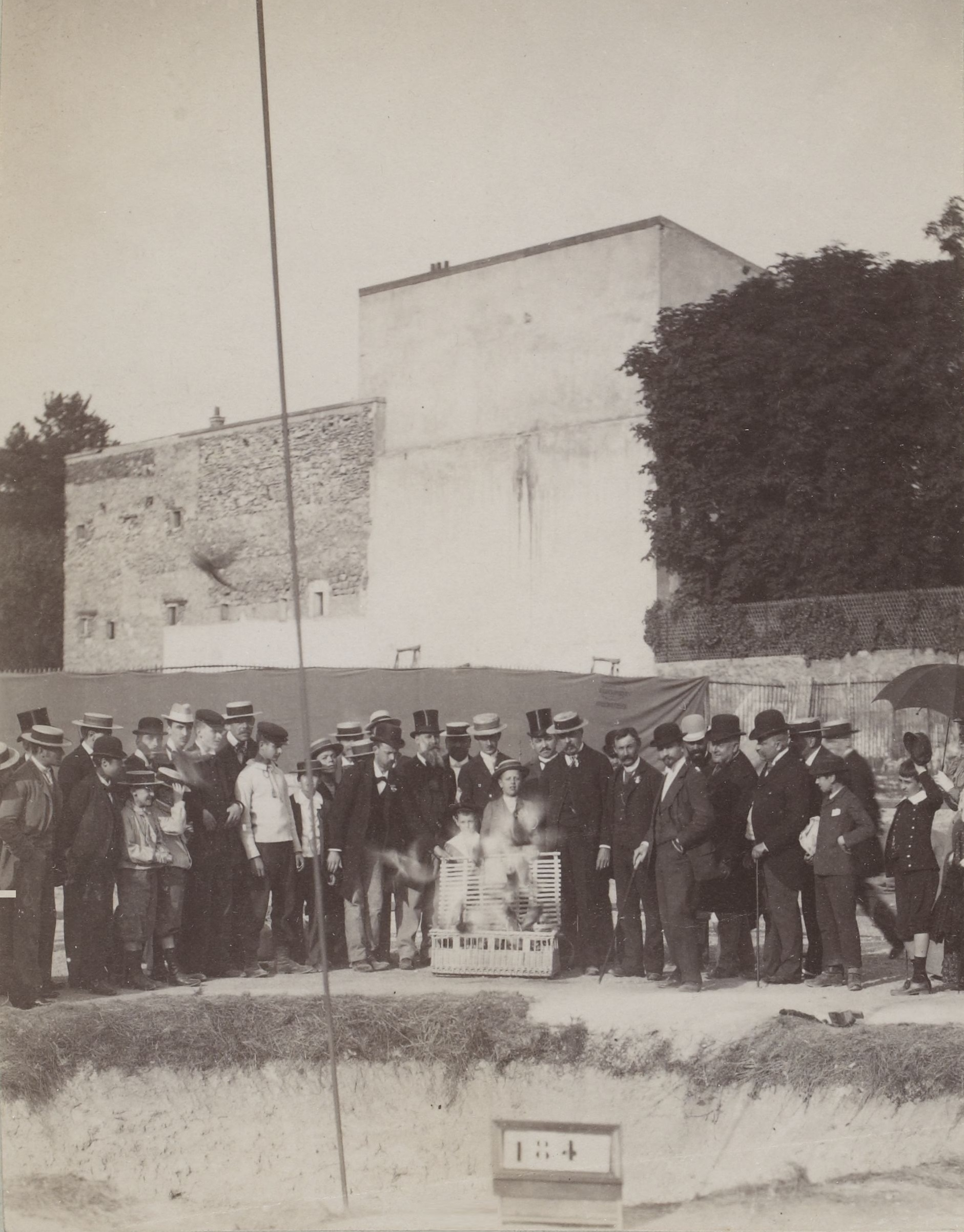 [Collection Jules Beau. Photographie sportive] : T. 5. Années 1897 et 1898 / Jules Beau : F. 46v. Lâcher de pigeons ; Meyer, Danois ; Van Marke [Van Marcke ? ] ; Varennes